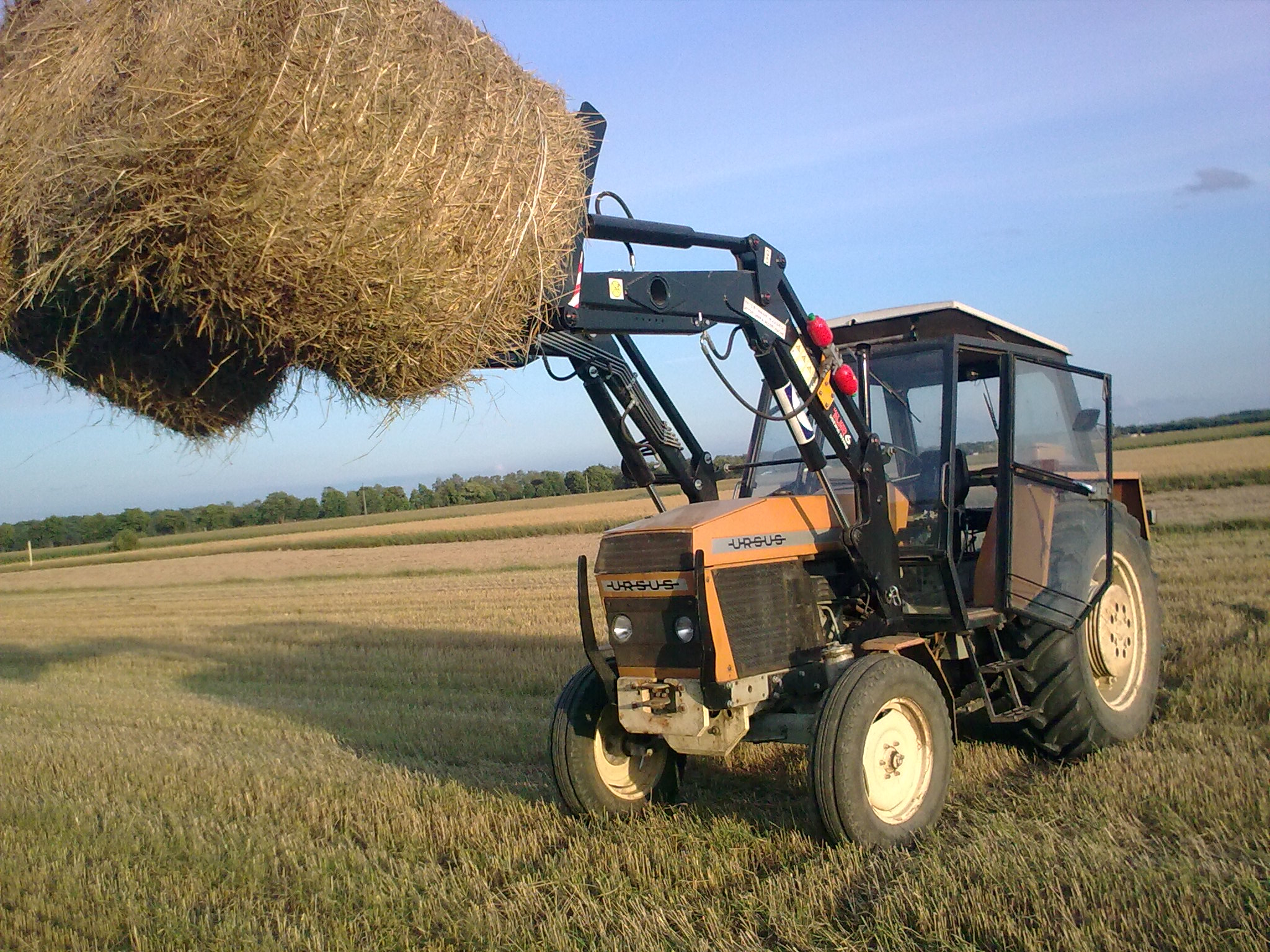 Ursus 912 widok z przodu